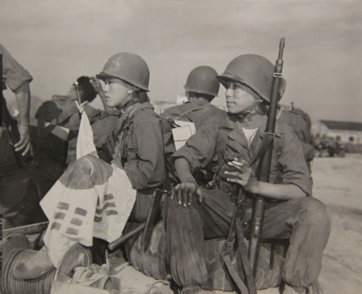 한강으로 향하는 m1903을 든 해병